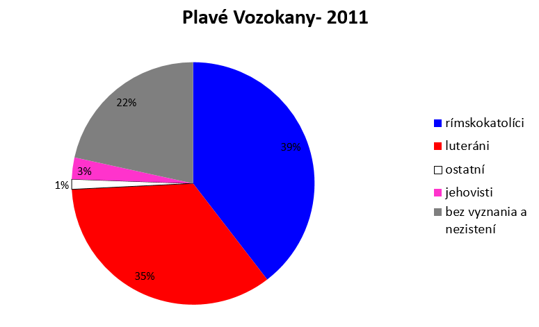 náboženské zloženie